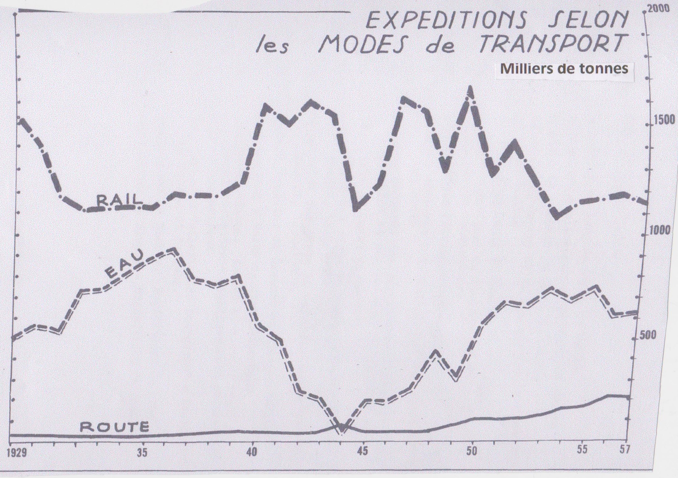 Répartition des expéditions de charbon des HBB entre route, rail et canal